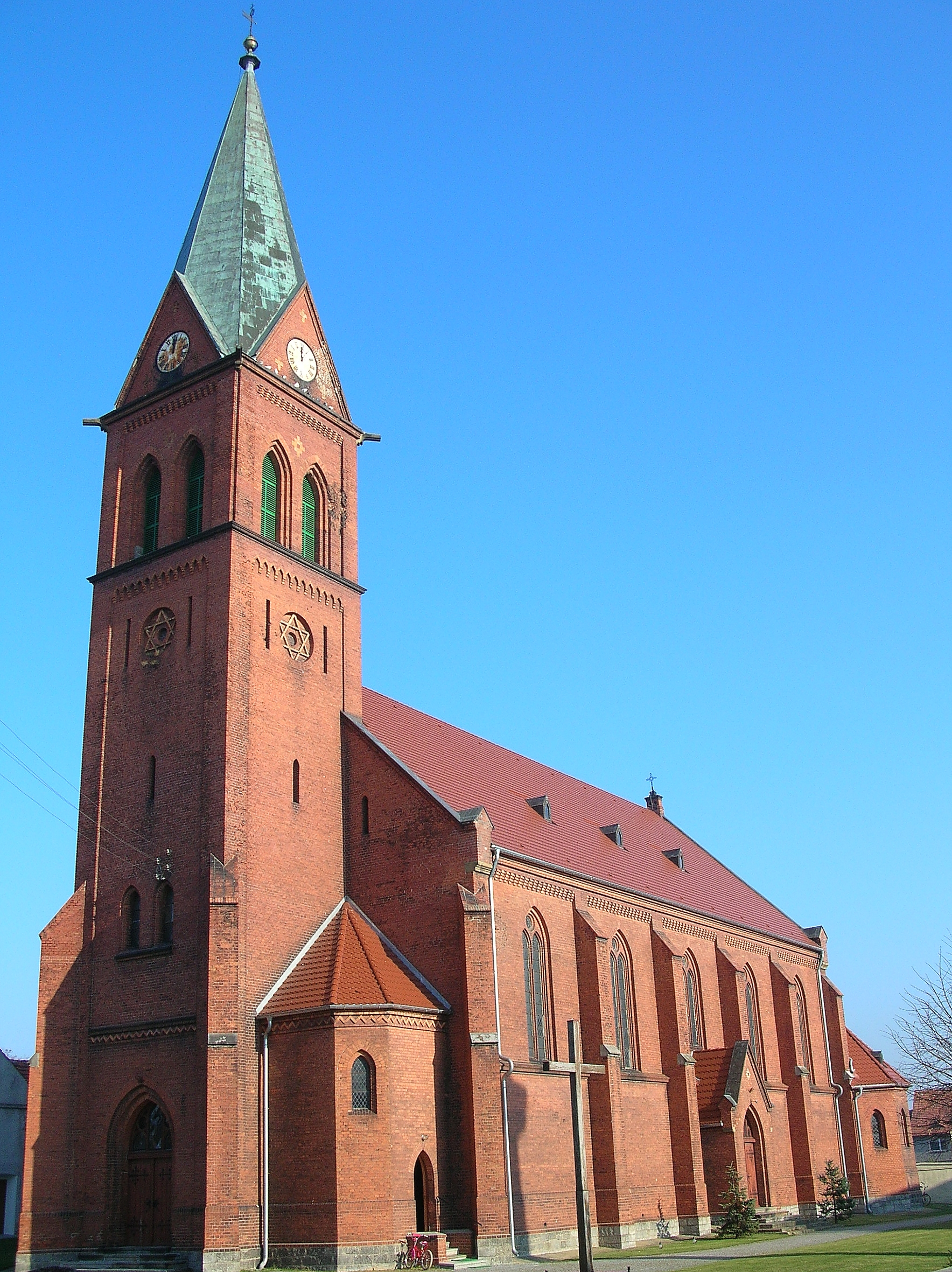 Osiek - kościół (zabytek nr A/1054)